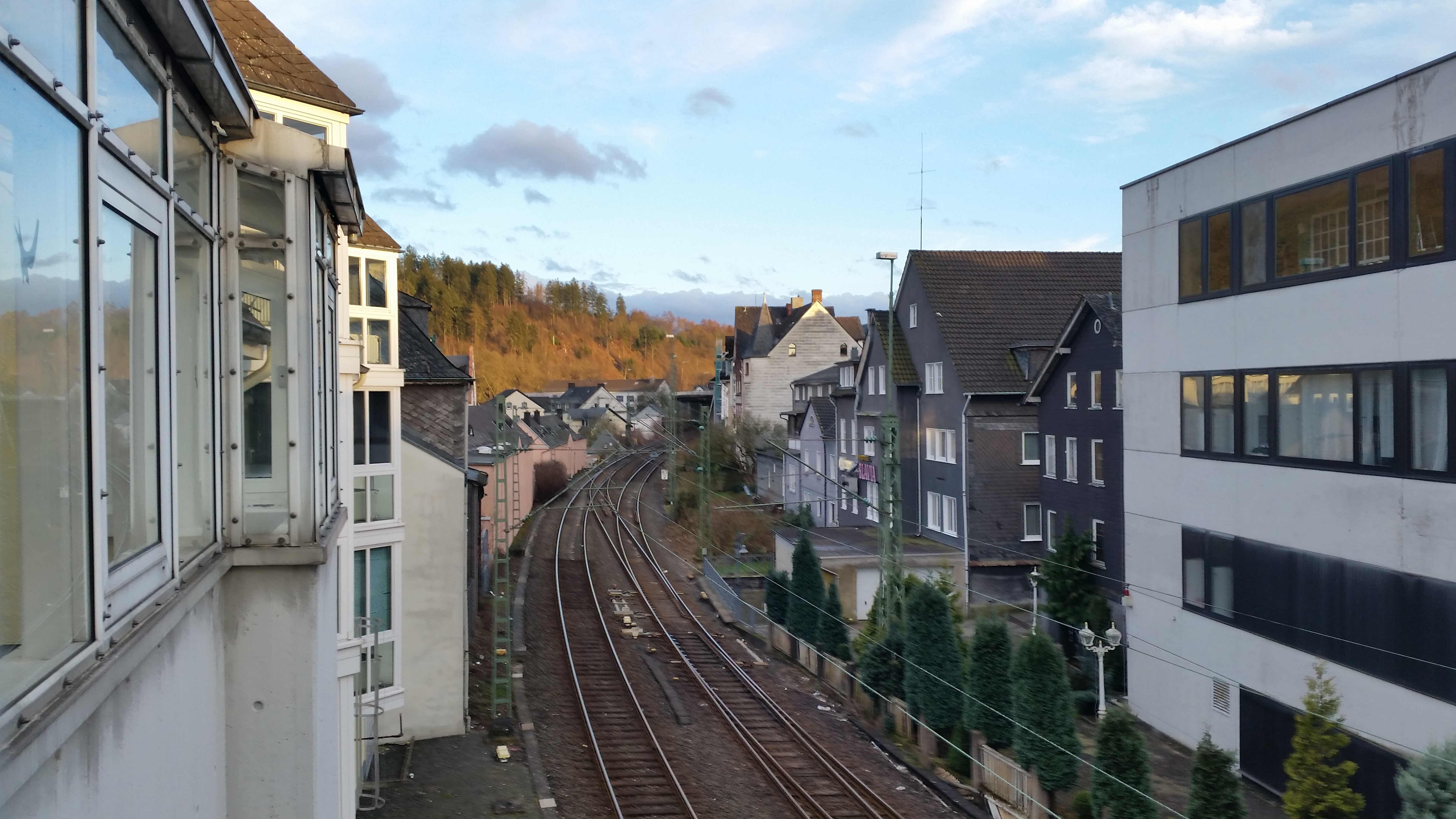 Die "historische" Deutz-Gießener-Eisenbahn-Strecke am Abzw. Betzdorf mit der alten Kilometrierung. Der Arm, auf dem heute die "Hellertalbahn" zwischen Betzdorf (Sieg) und Dillenburg über Herdorf/Haiger verkehrt ist heute eine nicht elektrifizierte Nebenstrecke und nur eingleisig. Das rechte Gleis ist komplett eigenständig für die ebenfalls einspurige, im Jahr 1995 privatisierte "Daadetalbahn" nach Daaden (Westerwald). Die auf dem Bild ersichtliche Weiche ist die letzte Weiche nach Betzdorf. Hinter der Kurve kommt nach rund 2 km Alsdorf (Daadetalbahn) bzw. Grünebach (Hellertalbahn) und die Strecken gehen getrennte Wege. In Höhe der Weiche sieht man auch das Schild, das die Kilometrierung anzeigt: 83,2 km seit Köln-Deutz